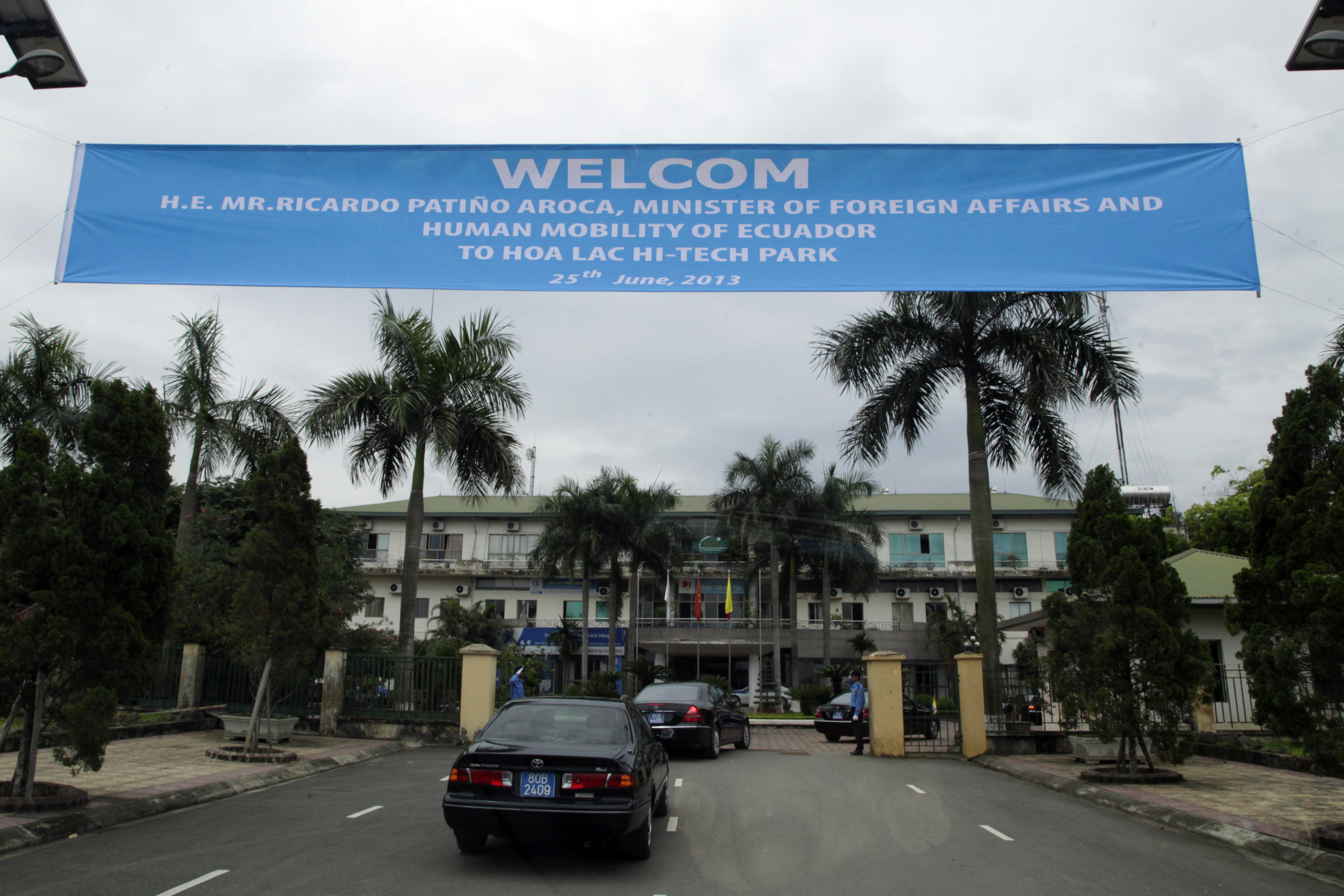 Hanoi (Vietnam), 24 de Junio del 2013. El Canciller Ricardo Patiño realizó una visita a Hoa Lac Hi-tech Park y se reunió con el vicepresidente del parque tecnológico, Nguyen Duy Thang. Foto: Xavier Granja Cedeño - Ministerio de Relaciones Exteriores y Movilidad Humana